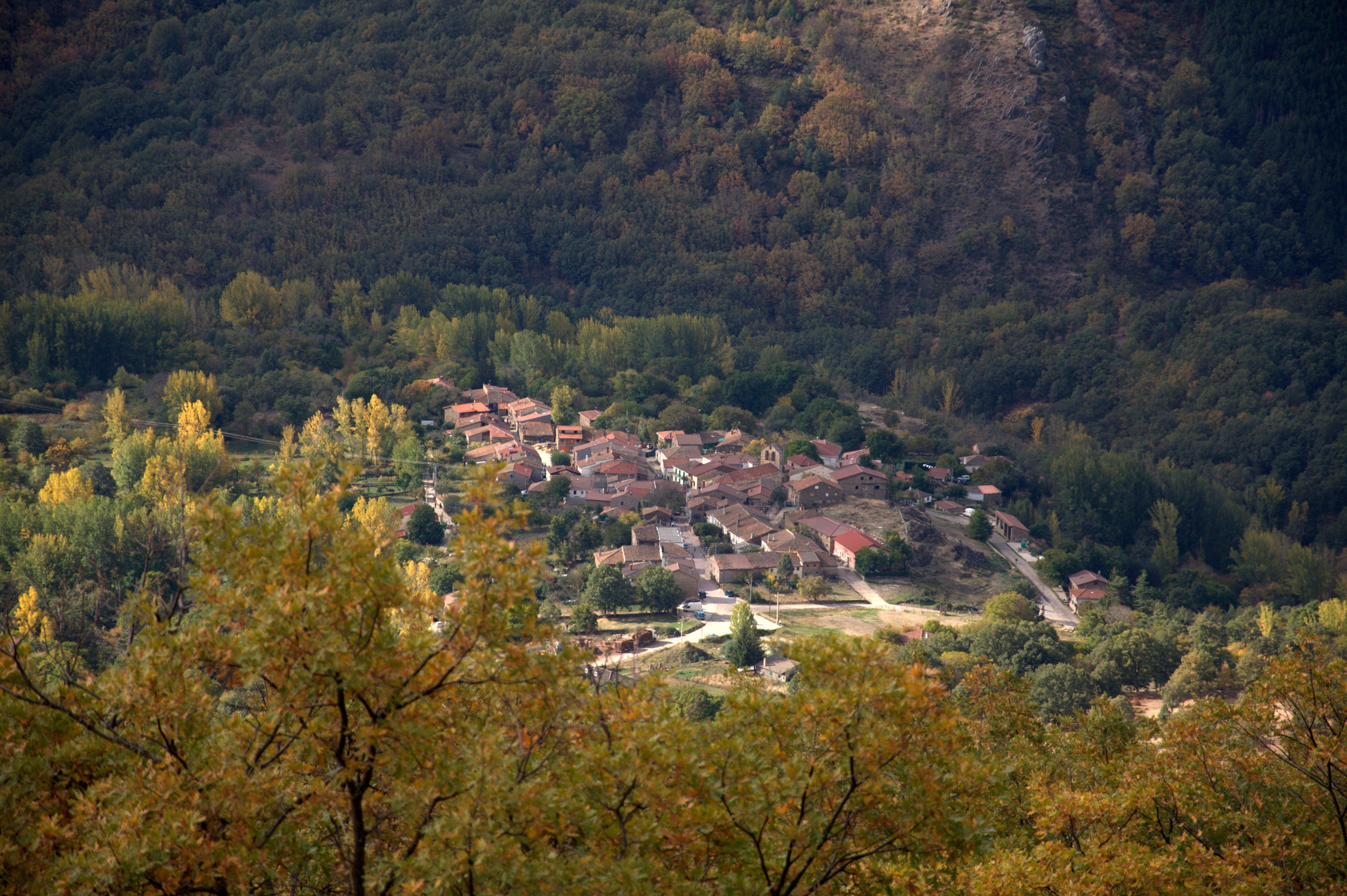 DSC_3184-1.jpg